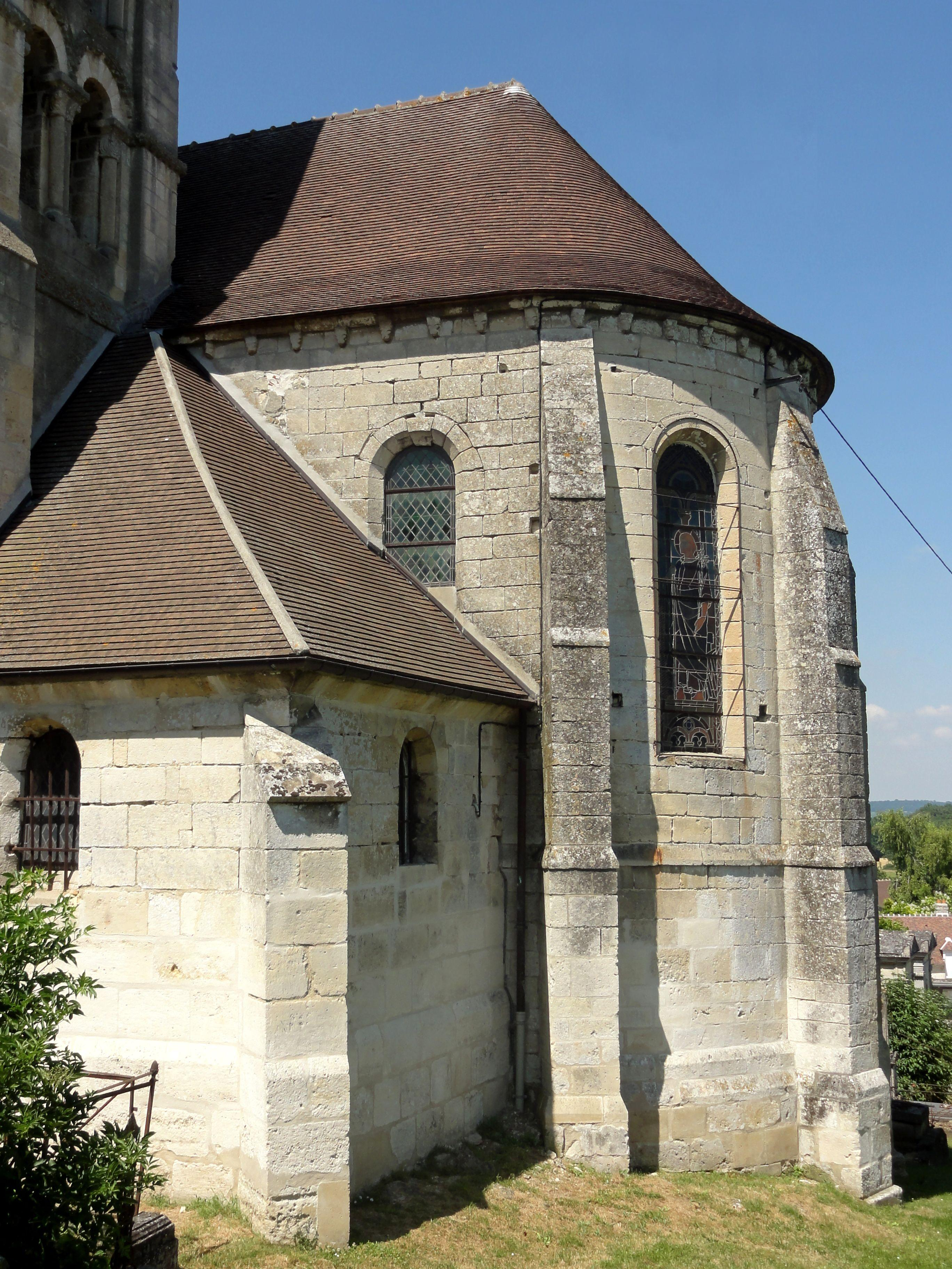 Chœur, côté sud.